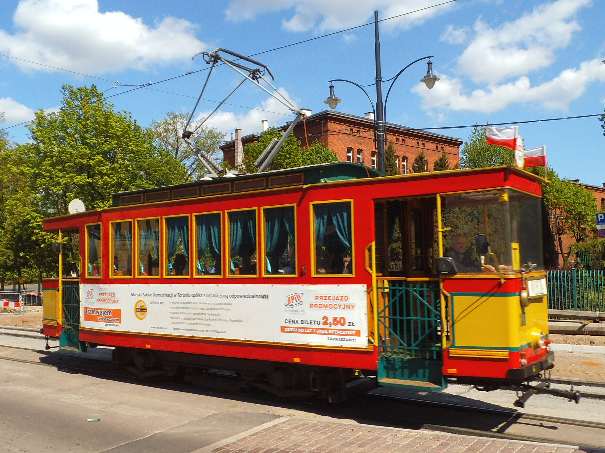 Tramwaj turystyczny w Toruniu